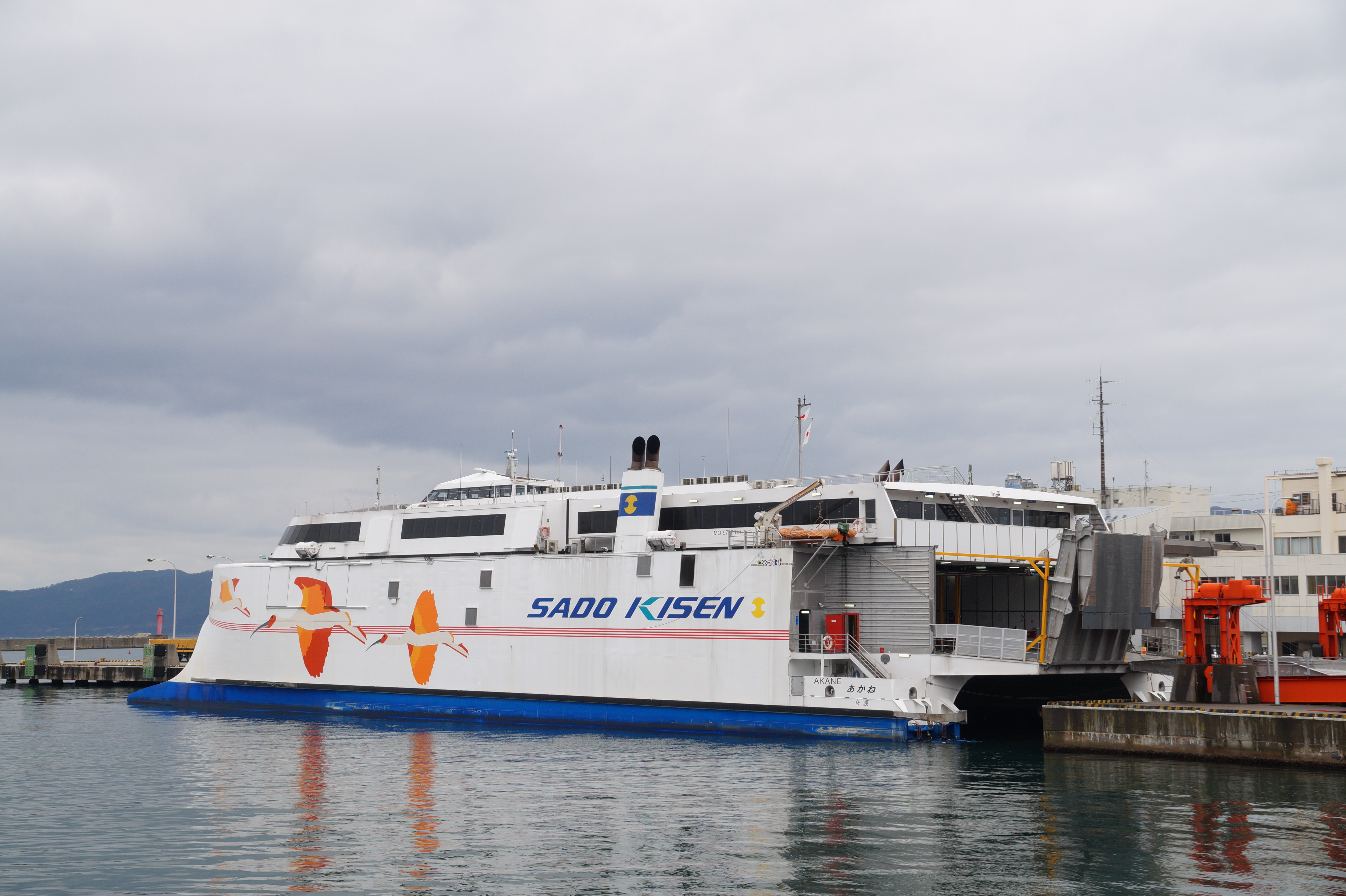 両津港佐渡汽船にて撮影